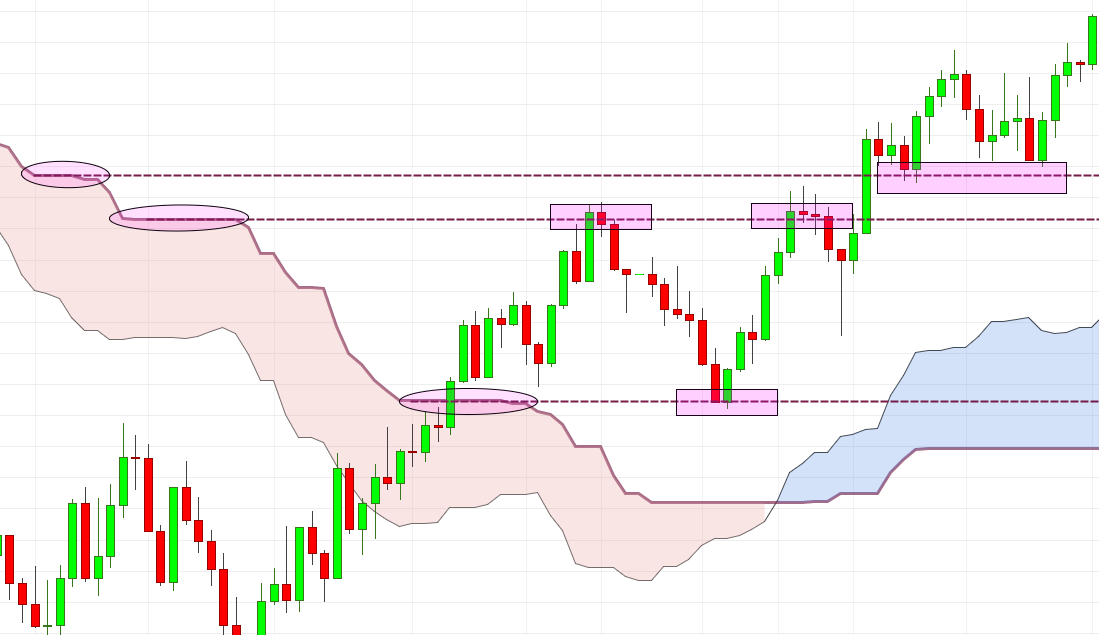 Ichimoku - Résistance support avec SSB